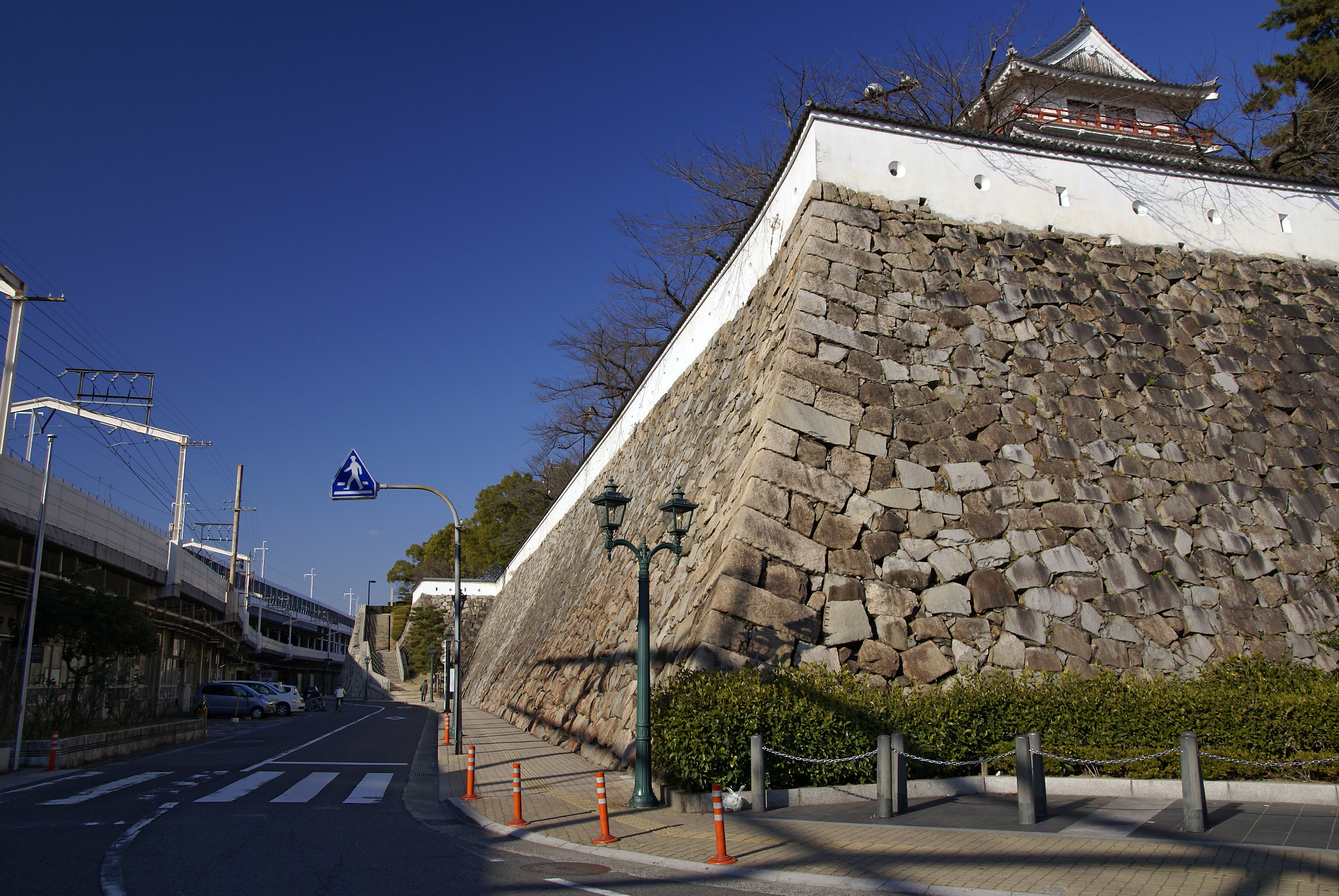 Fukuyama Station and Fukuyama Castle in Fukuyama, Hiroshima prefecture, Japan